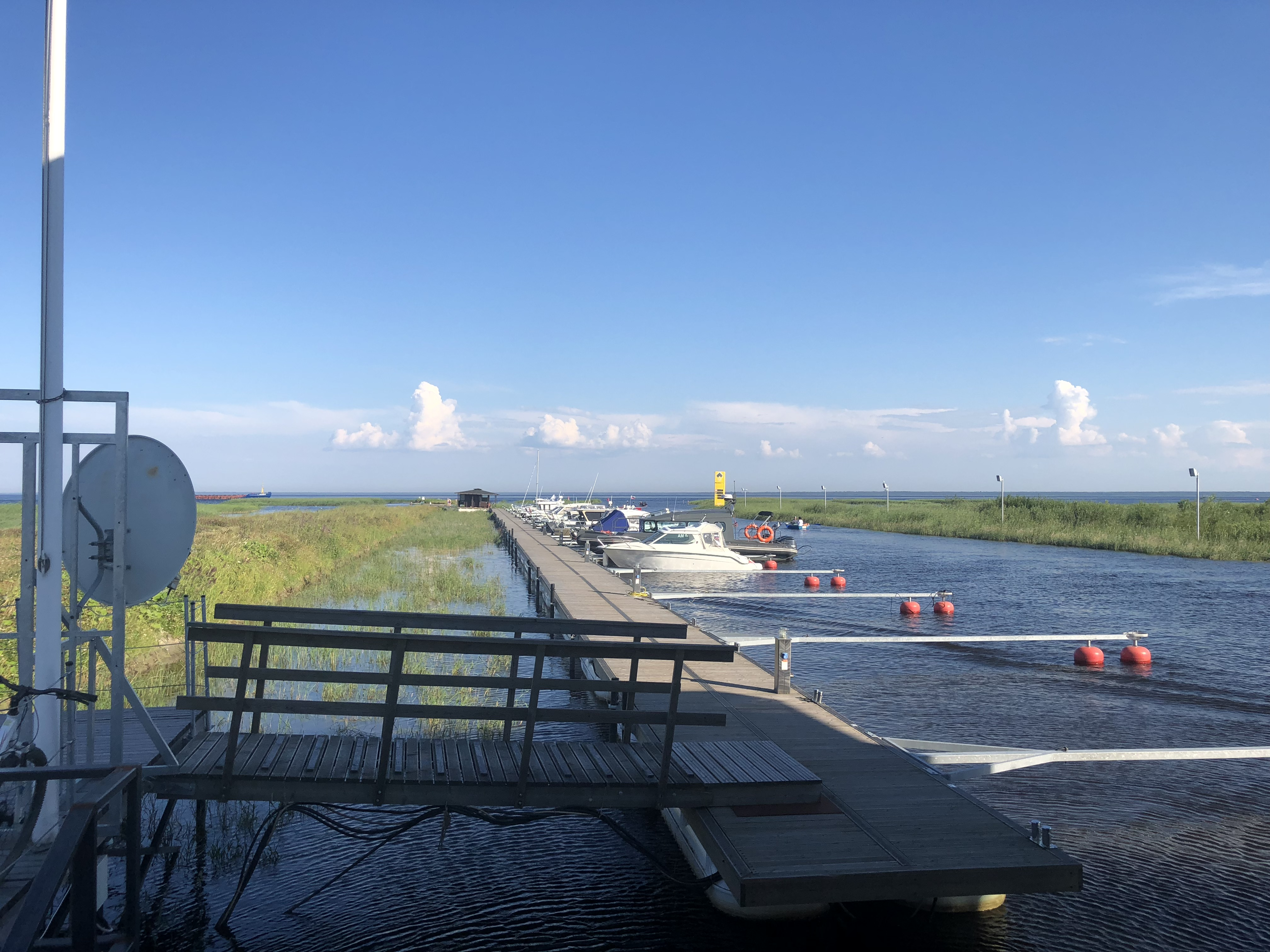 Кошкин. Ладожское озеро